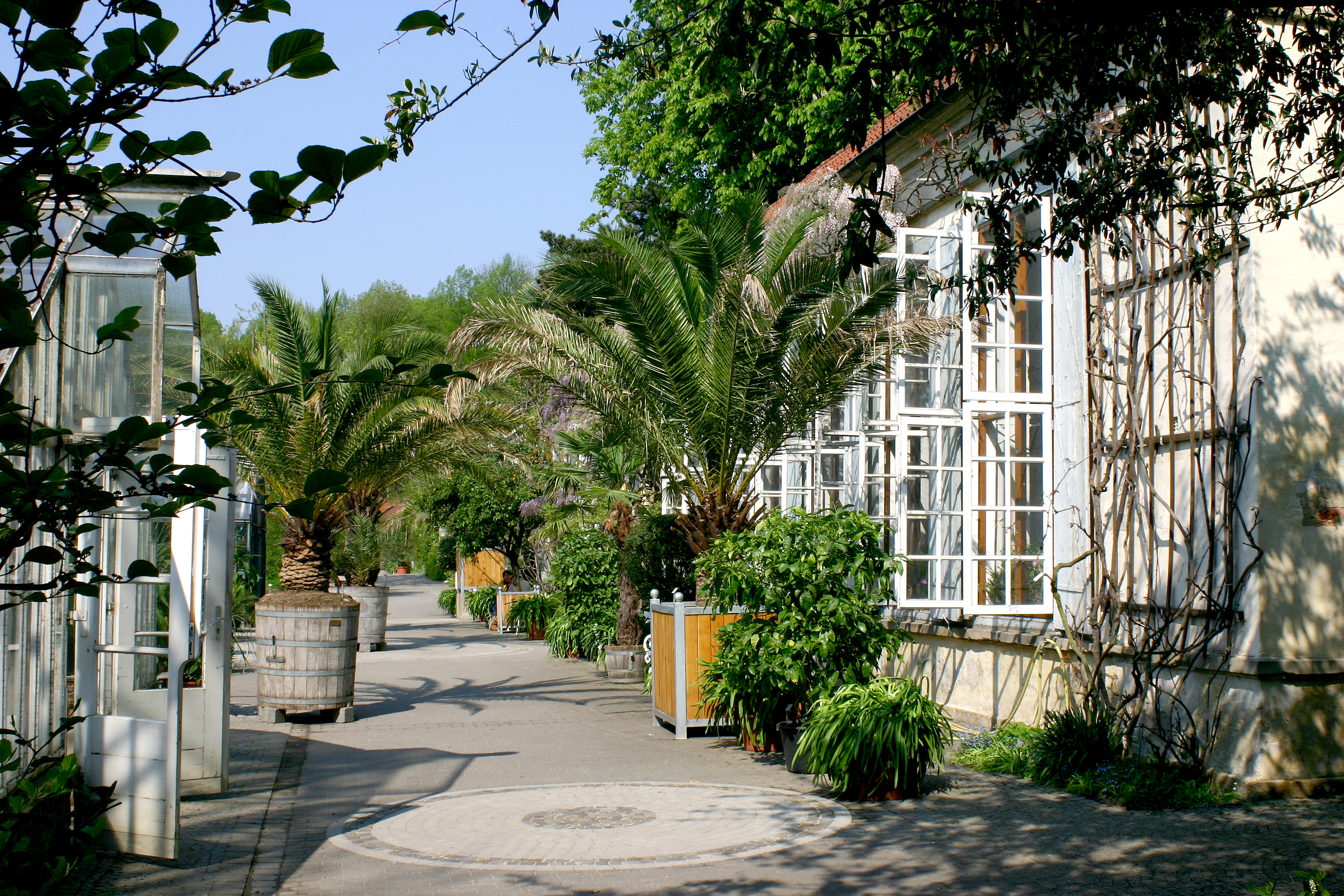 Pflanzkübel, Orangerie im Botanischen Garten der WWU-Münster